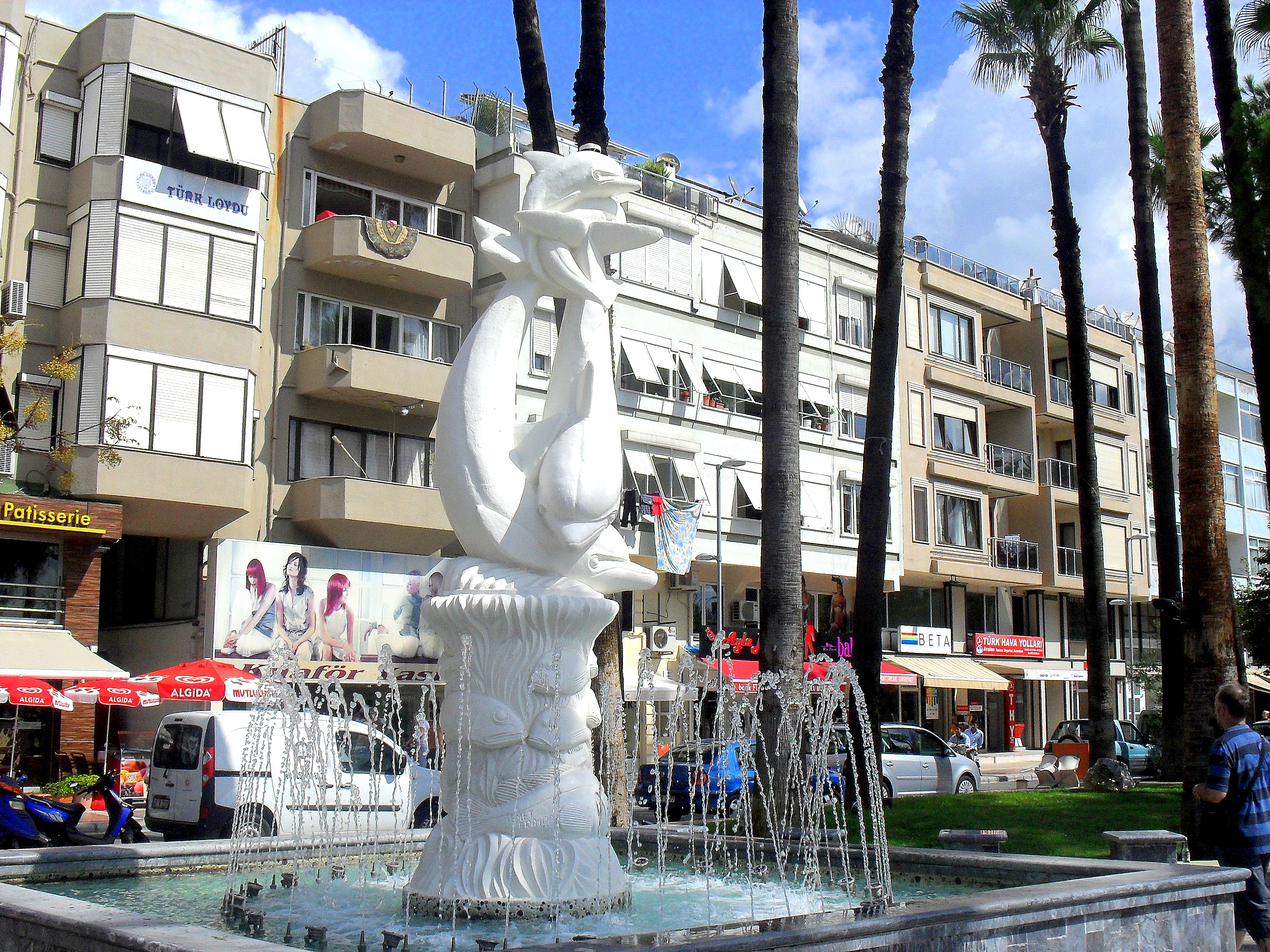 Marmaris, centrum, fontanna z delfinami